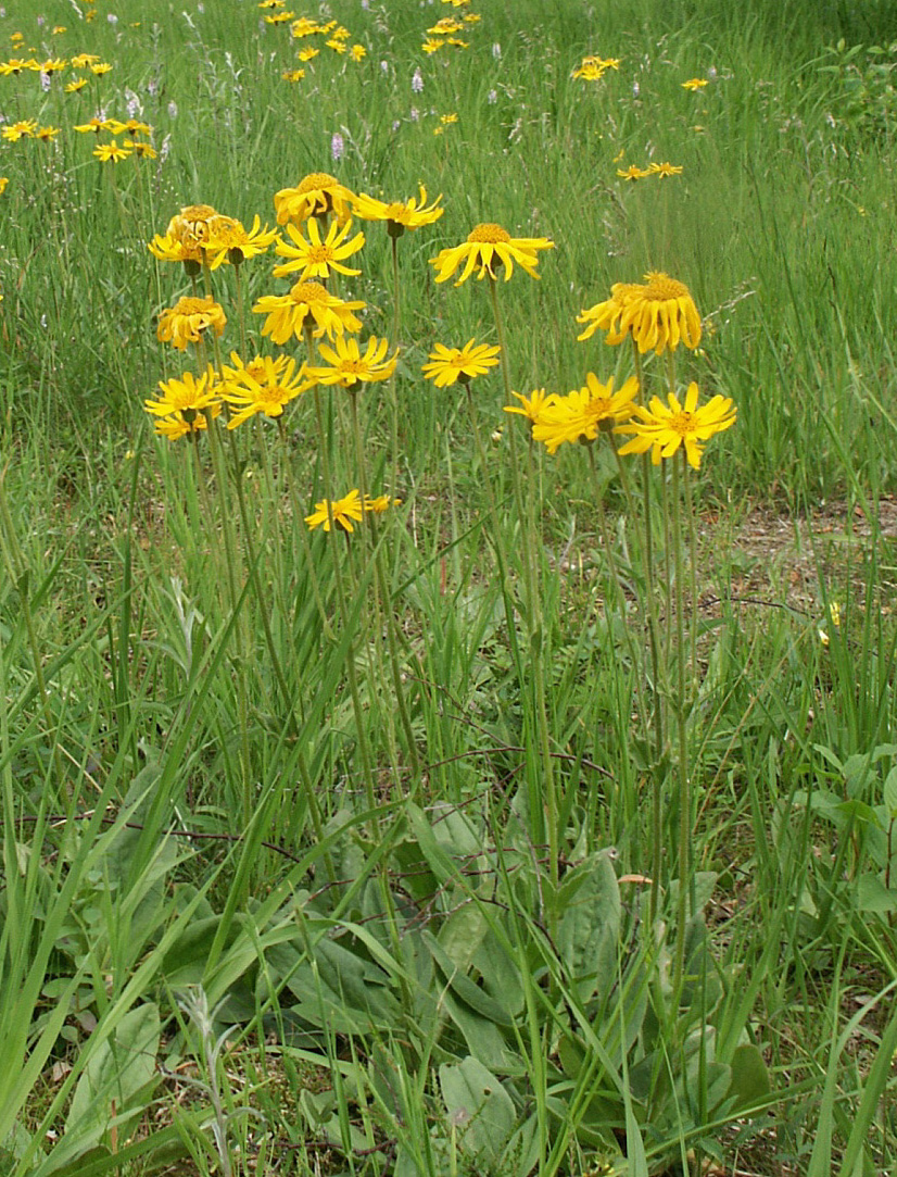 Arnica montana, Festuco-Genistetum sagittalis, Schwäbisch-Fränkischer Wald, Germany